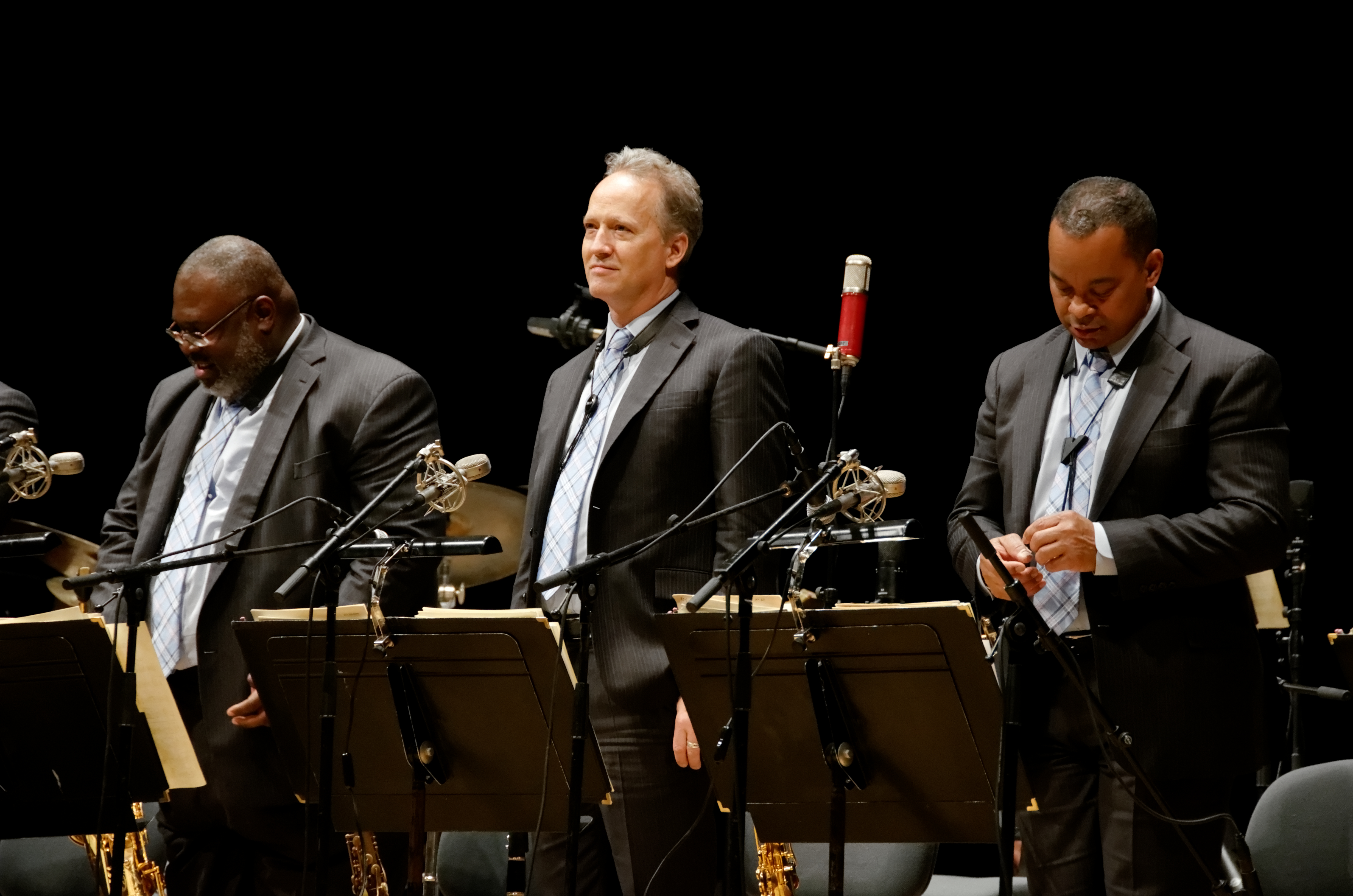 Jazz at Lincoln Center Orchestra (JLCO). Auditorium Maurice Ravel, Lyon. 6 février 2016. De gauche à droite : Sherman Irby, Ted Nash, Victor Goines